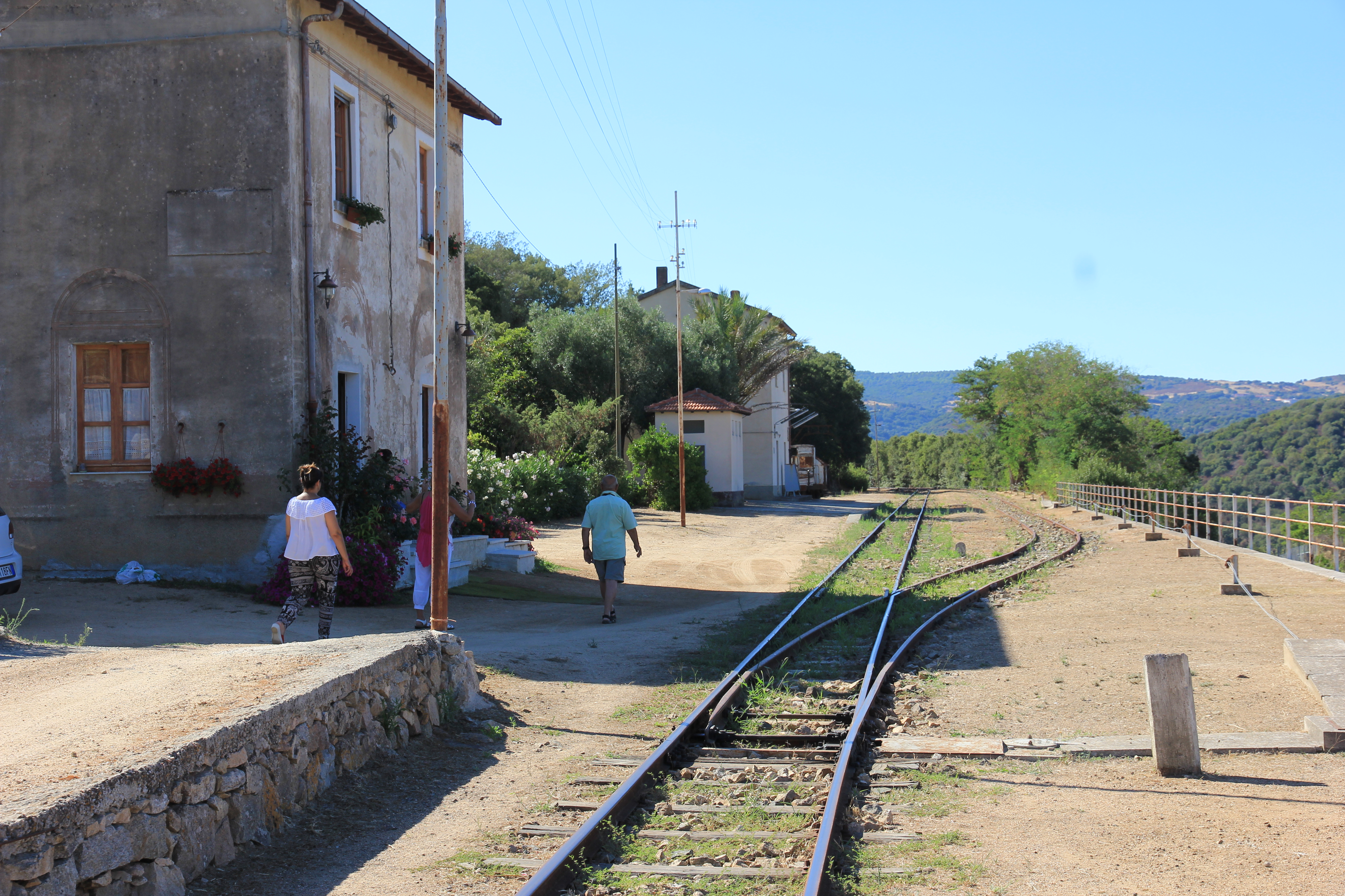 Sant'Antonio di Gallura, stazione ferroviaria